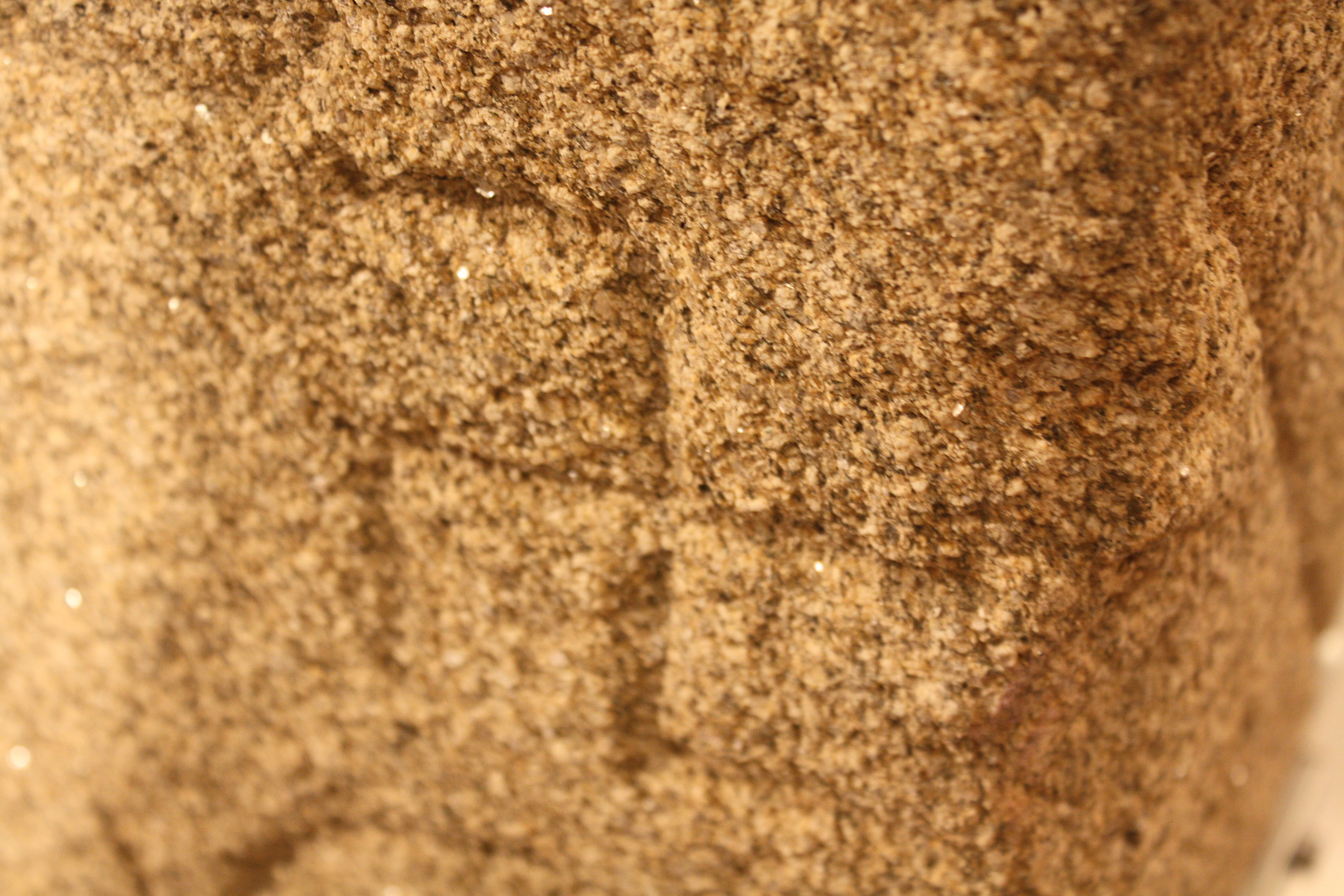 Esvástica levóxira nunha estela funeraria romana, exposta no Edificio Sarmiento do Museo de Pontevedra.